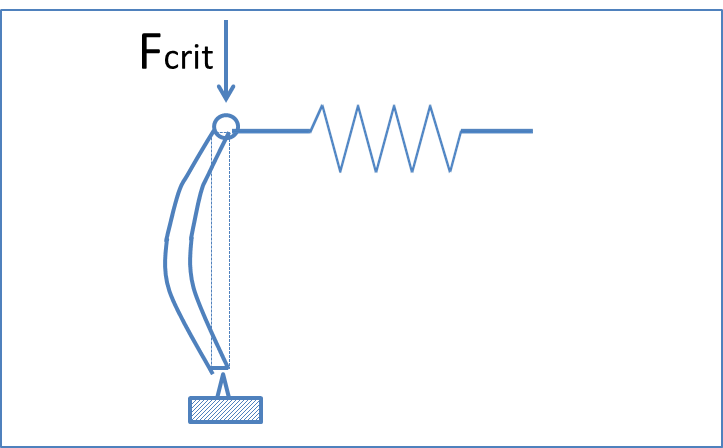 Fig. 5